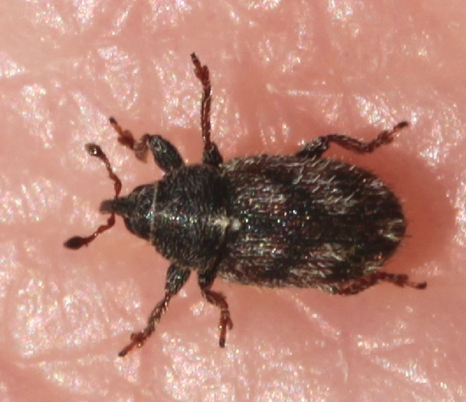 Schrägbinden-Gallenrüssler (Mecinus labilis) am 20. Januar 2020 an einem Platanenstamm in Walldorf/Baden